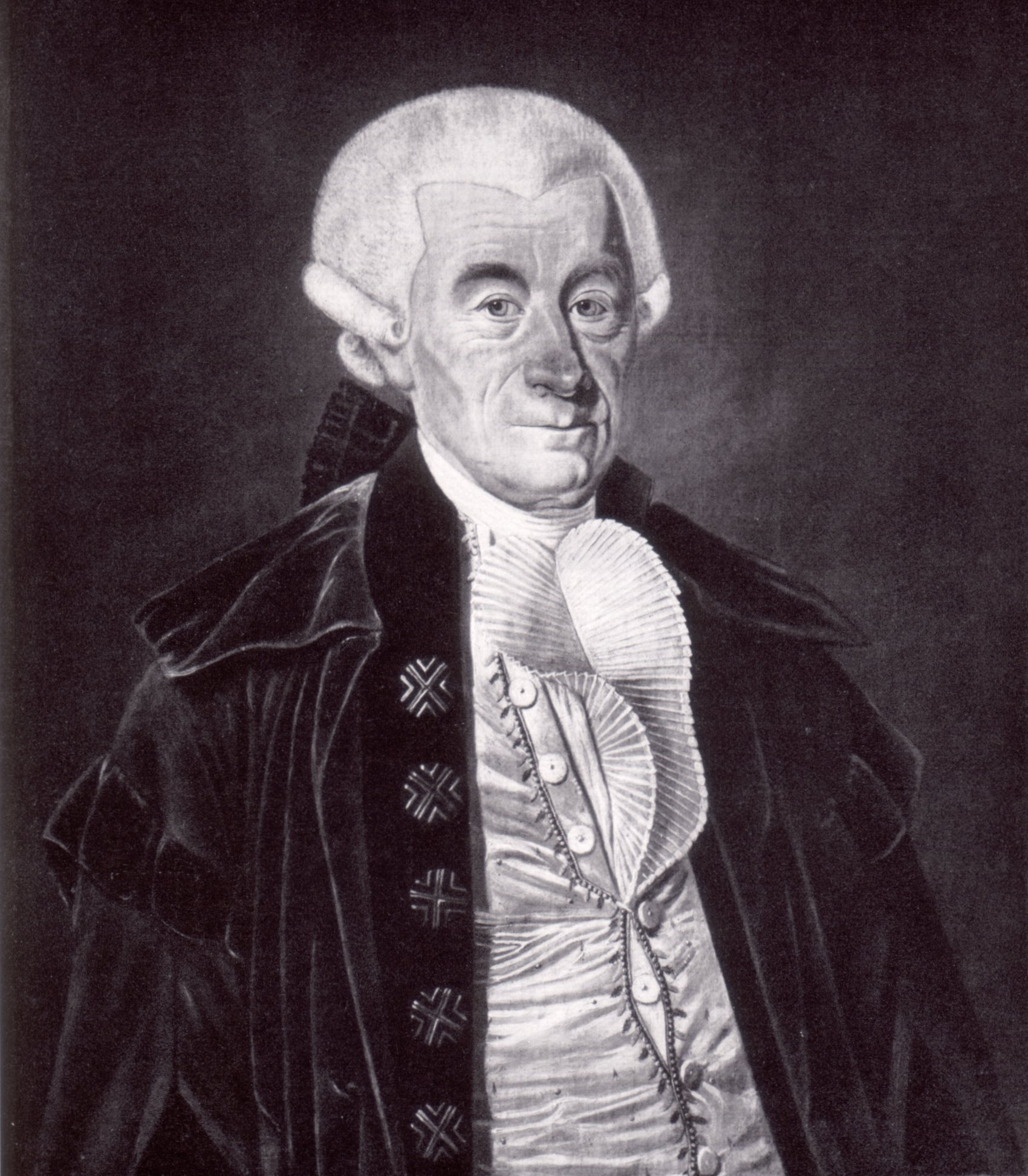 Abbildung des Gemäldes "Johann Stephan Pütter aus Iserlohn" von Carl Lafontaine.